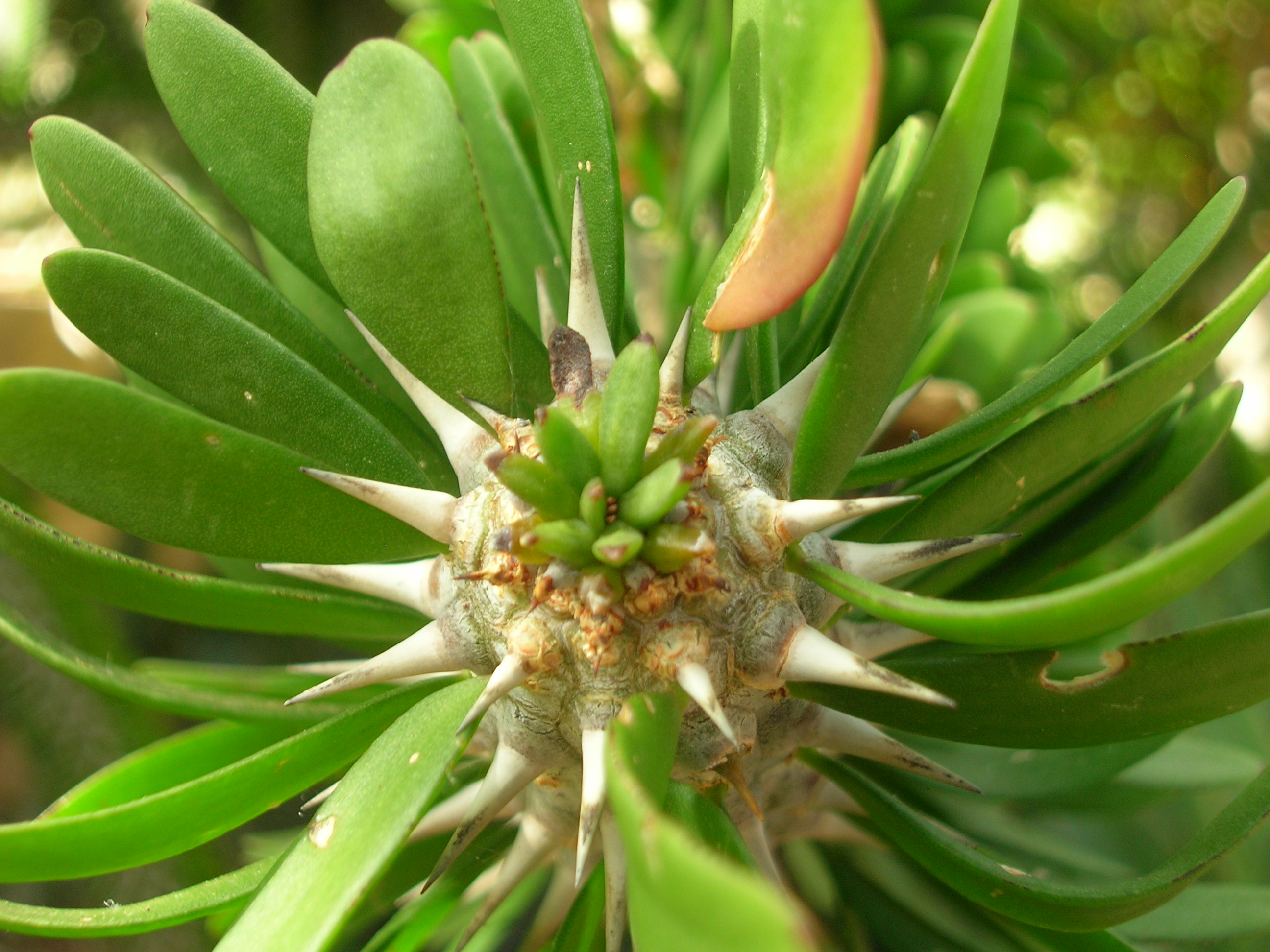 Didiereaceae Alluaudia procera Madagascar ocotillo Madagascar Succulent Palm house at Adelaide Botanical Garden i040707 115